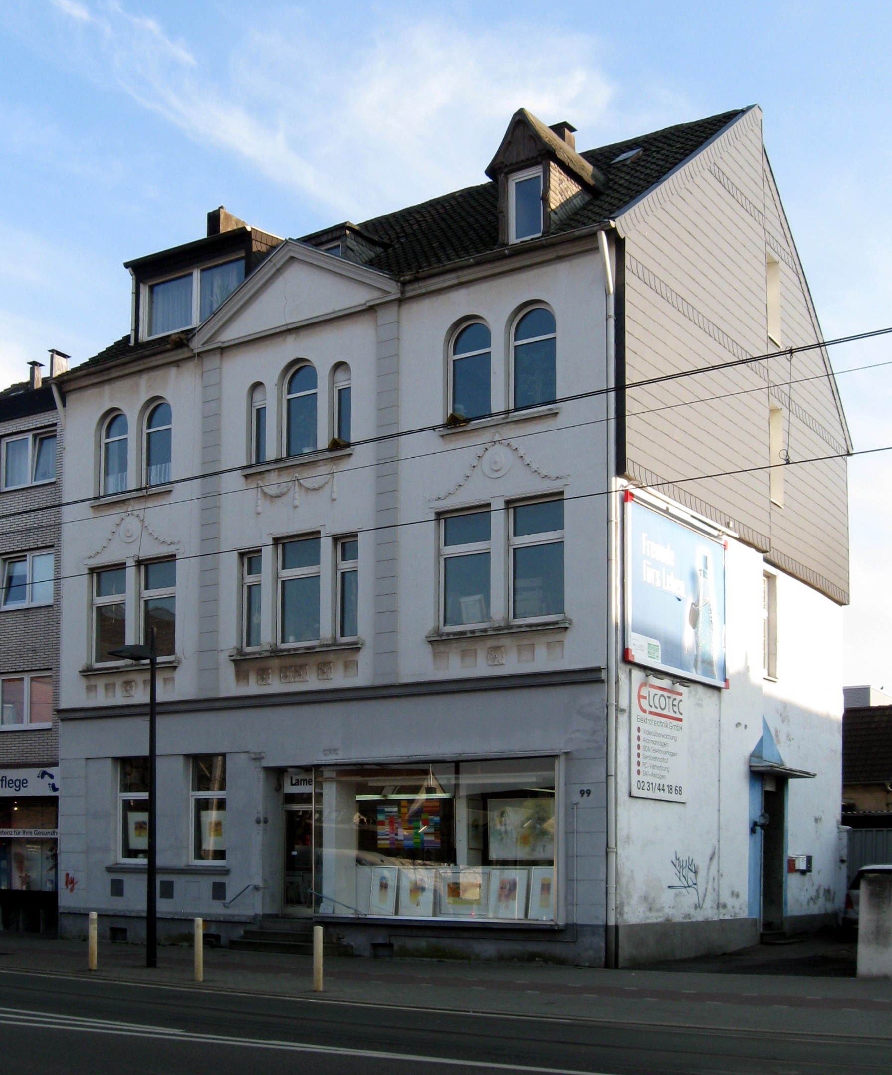 Stolpersteine in Dortmund, Asselner Hellweg 99, Gebäude